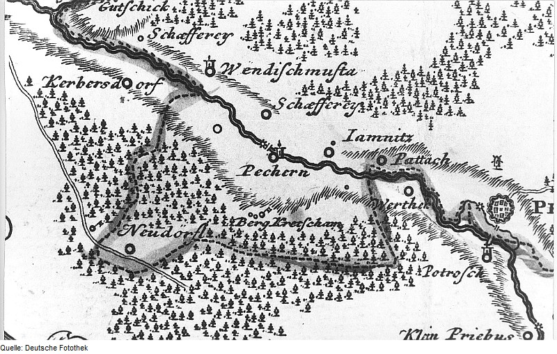 Original image description from the Deutsche Fotothek Krauschwitz-Pechern. Karte von Schlesien, Gebiet von Sagan, Homann, Nürnberg 1736 (Sign.: VII 125)